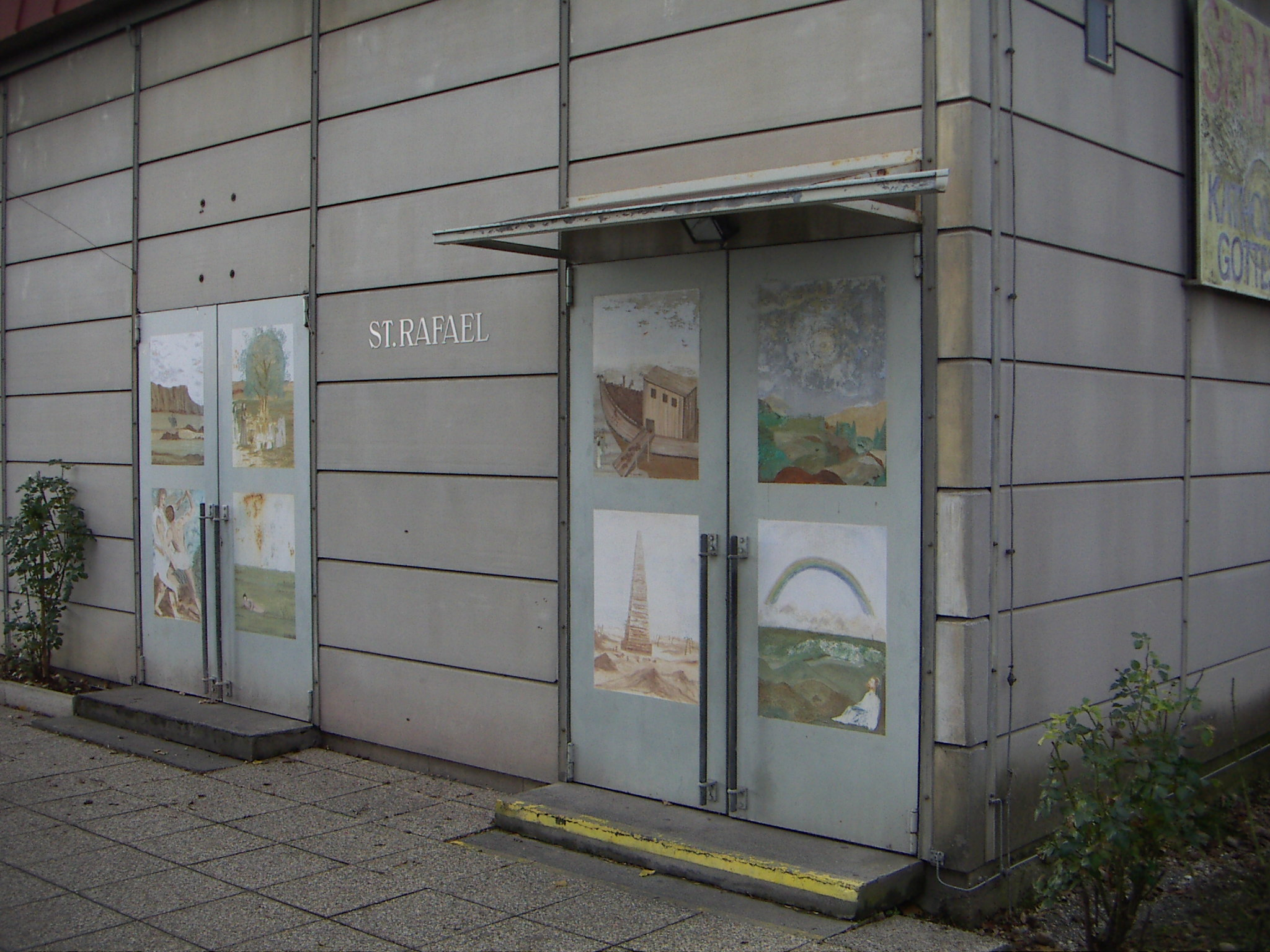 Seelsorgestation St. Rafael, Architekt Ottokar Uhl